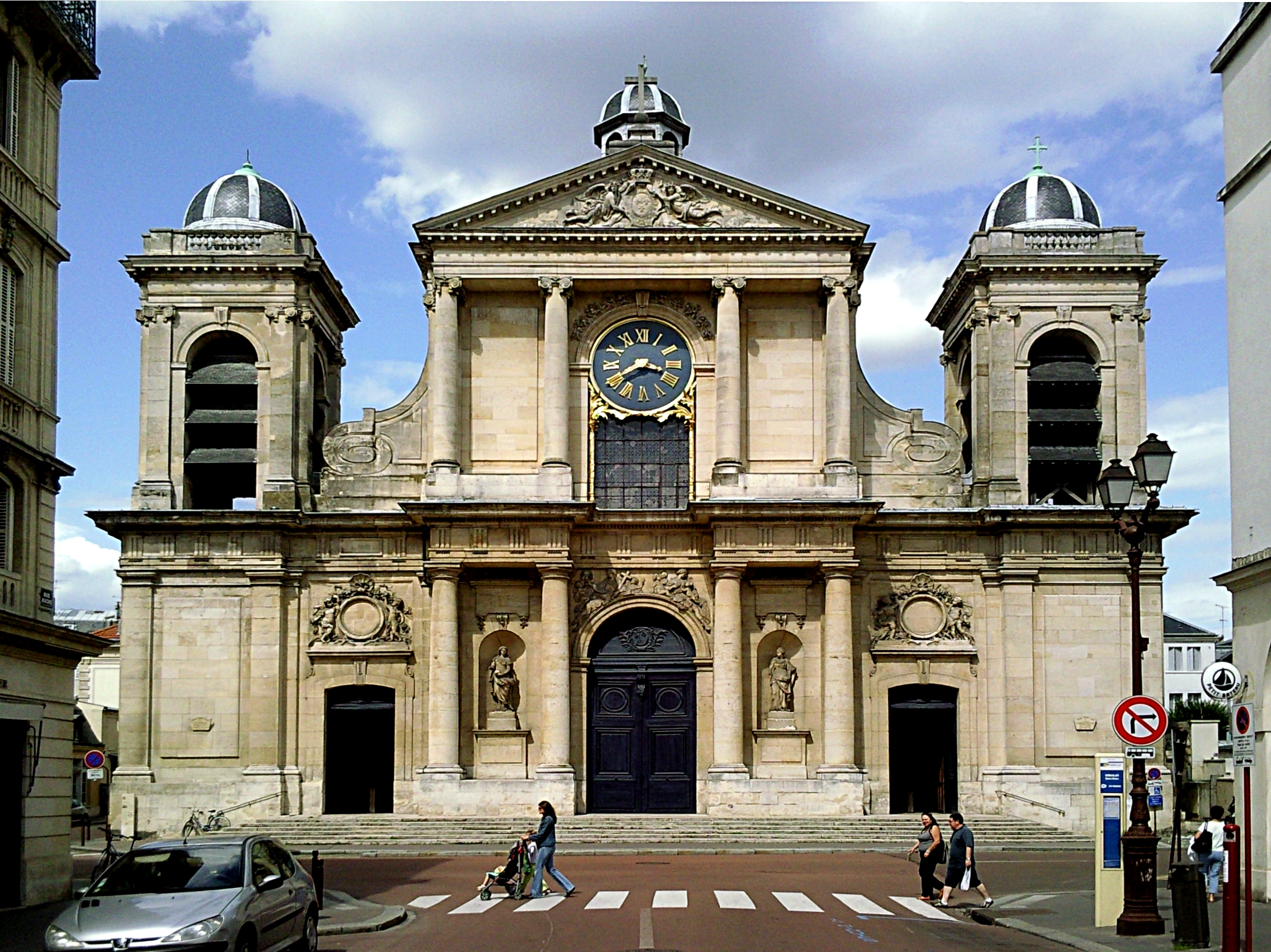 L'église Notre-Dame de Versailles (Yvelines).